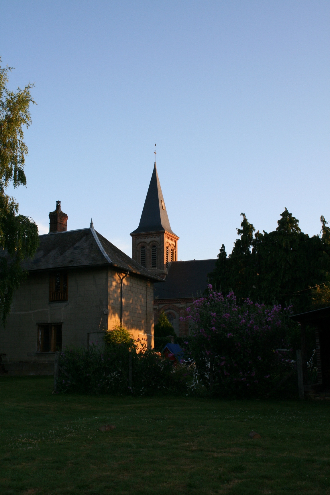 Villers-sur-Bonnières (Oise, Picardie, France) - Eglise. On remarque : . (A la date de l'import depuis Flickr par Marc ROUSSEL, l'auteur avait légendé sa photo ainsi : "...")